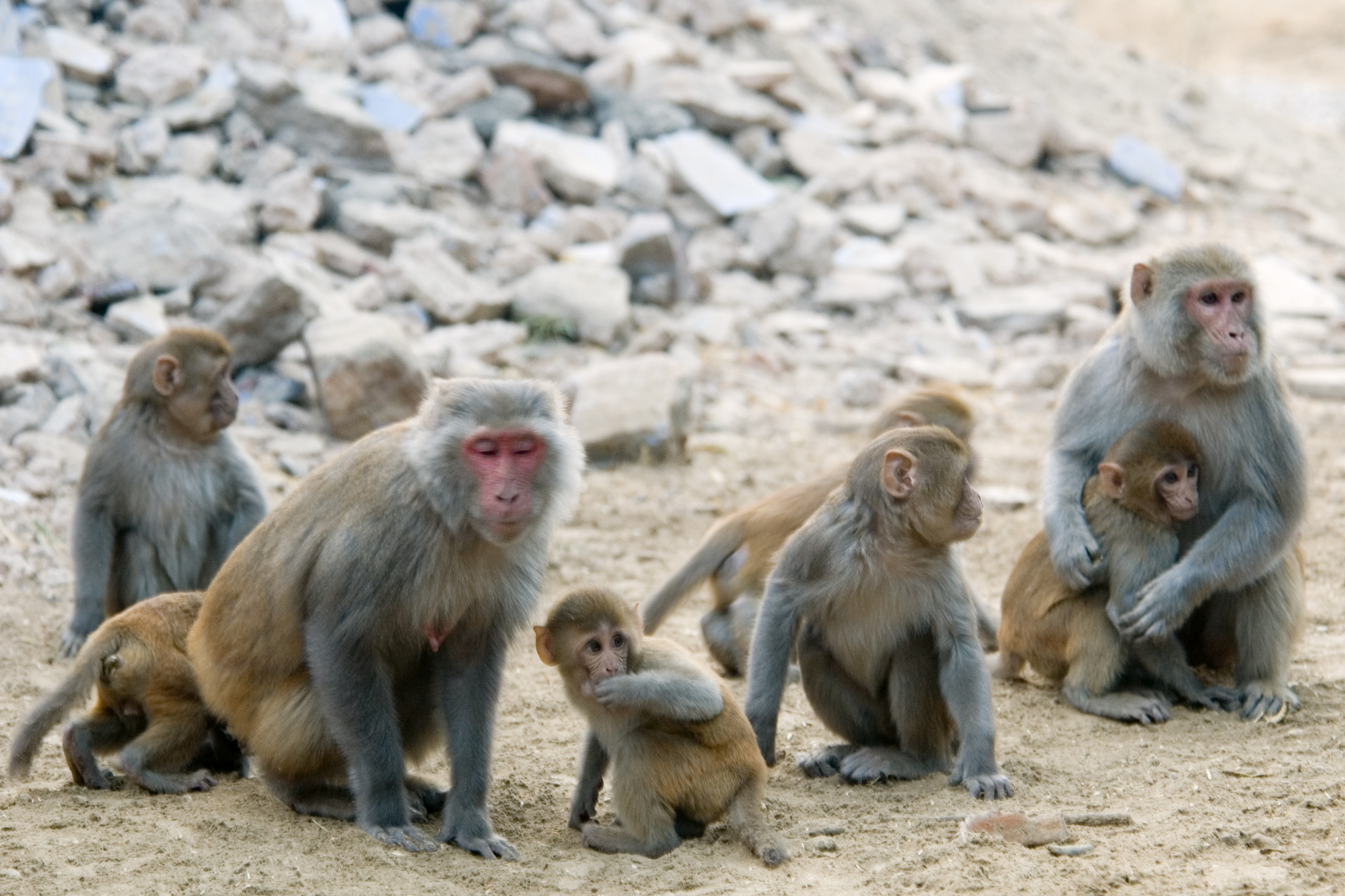 rhesus macaque Macaca mulatta